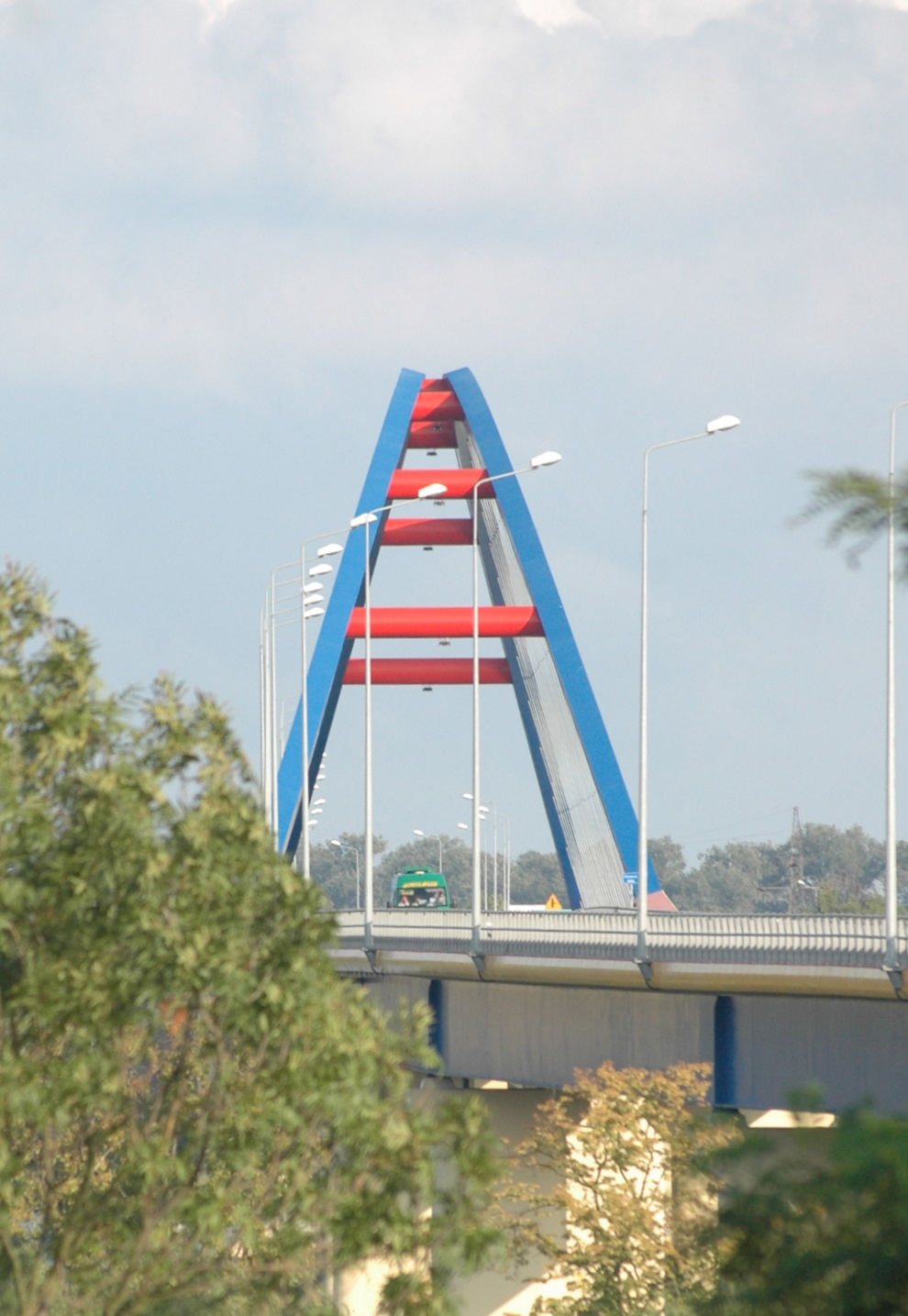 Most obwodowy w ciągu drogi krajowej numer 3 nad Dziwną w Wolinie.